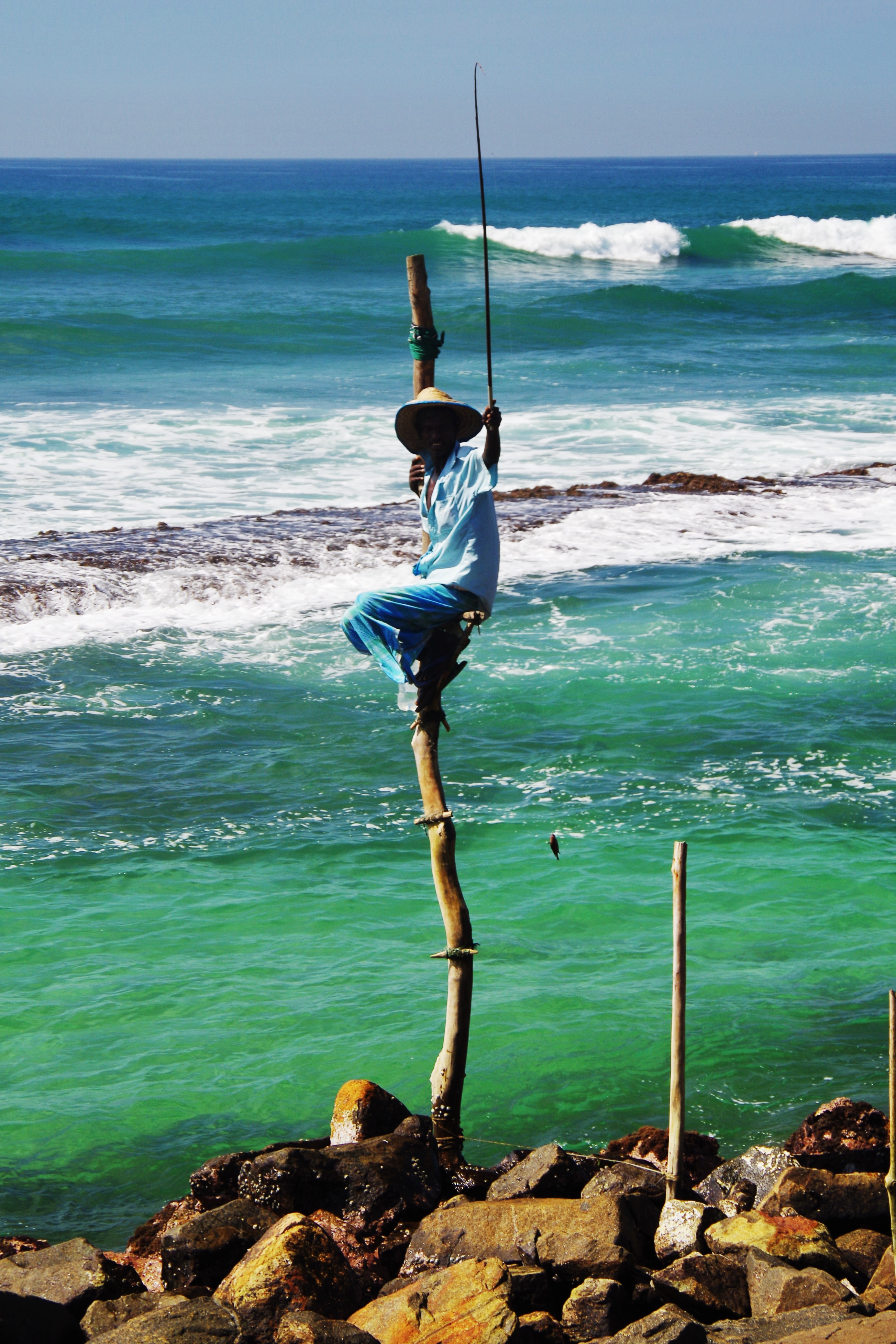 Stelzenfischer